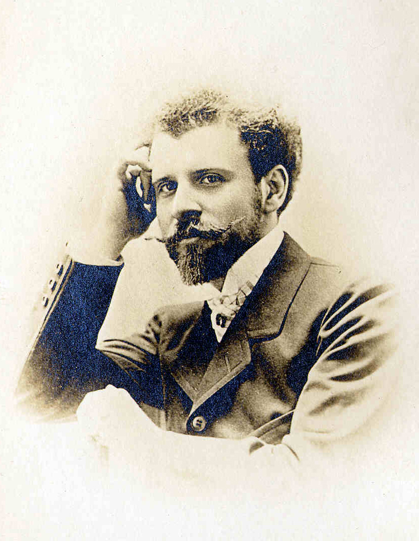 Polish composer and pianist Zygmunt Stojowski (1869-1946).